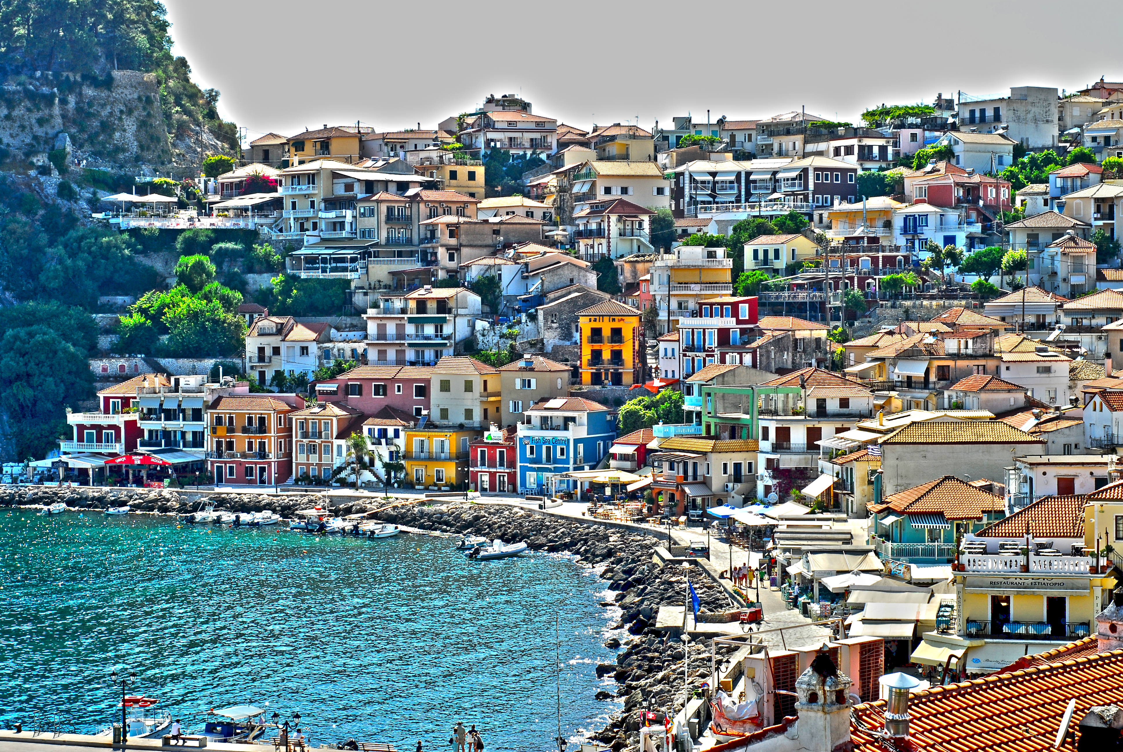 Πολύχρωμη Πάργα το καταμεσήμερο!! This is a photography of Natura 2000 protected area with ID GR2140003